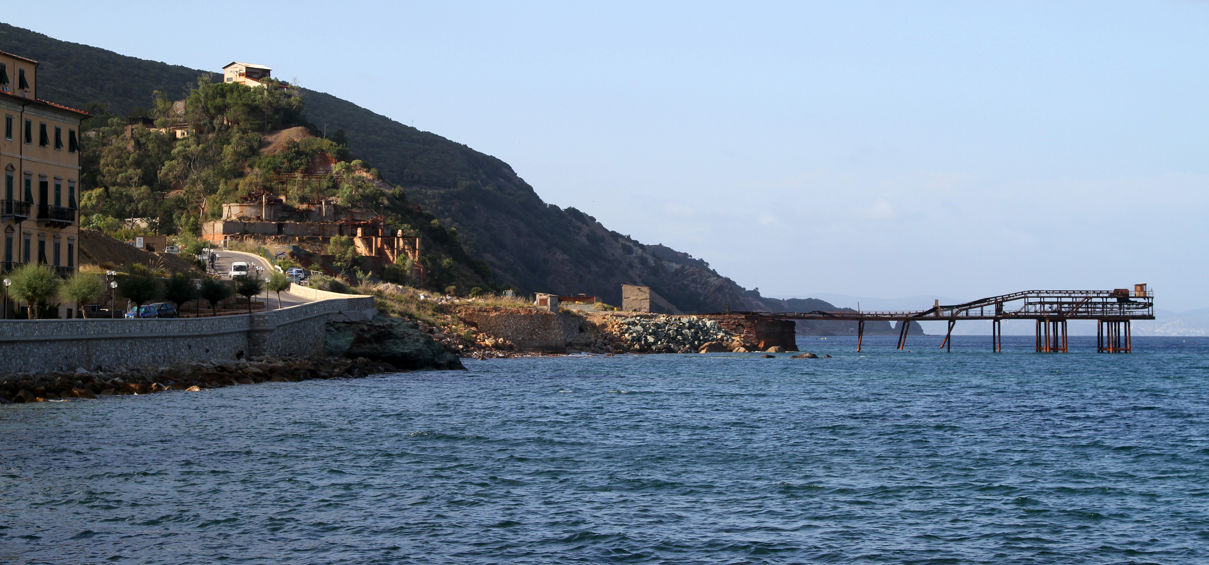 Rio Marina: relitti di miniera.